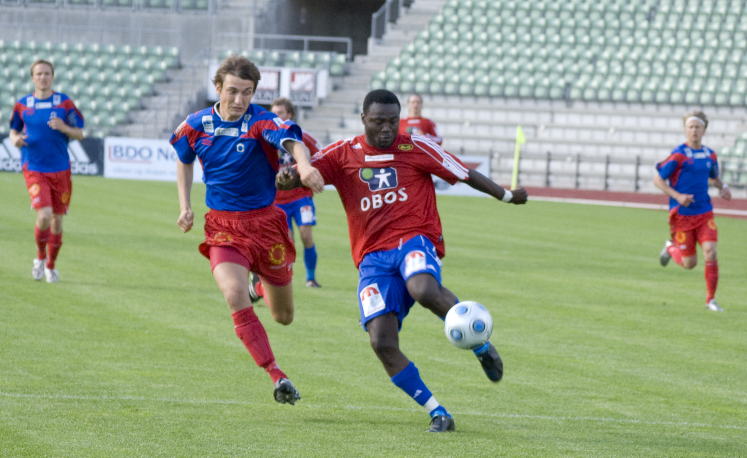 Skeid Fotball - Tromsdalen UIL 2-0 (2-0) at Bislett stadion 12 July 2009. Unknown player, Tromsdalen (left); Oluwasegun Abiodun, Skeid (right).